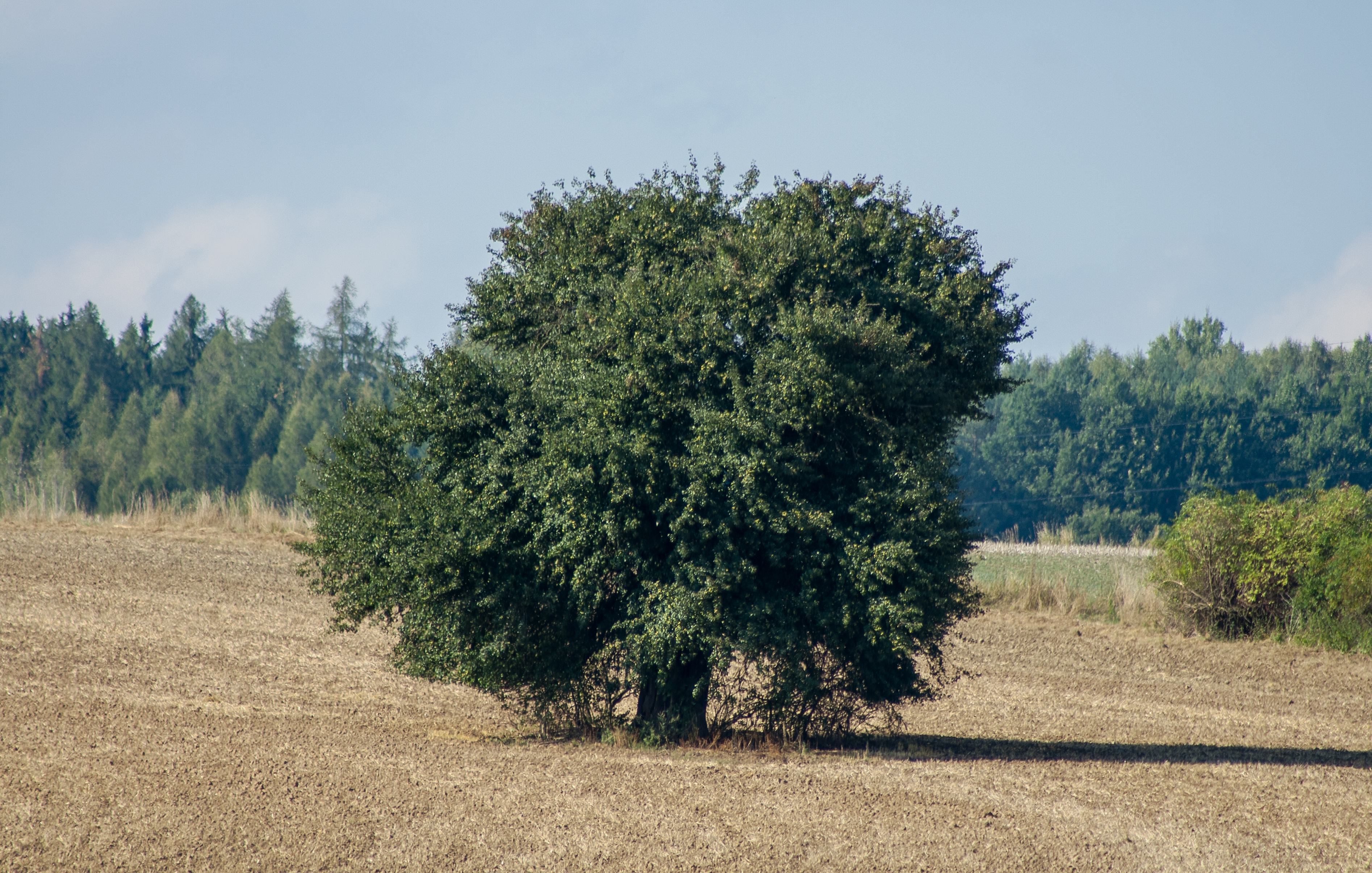 Nyklojc hruška v létě